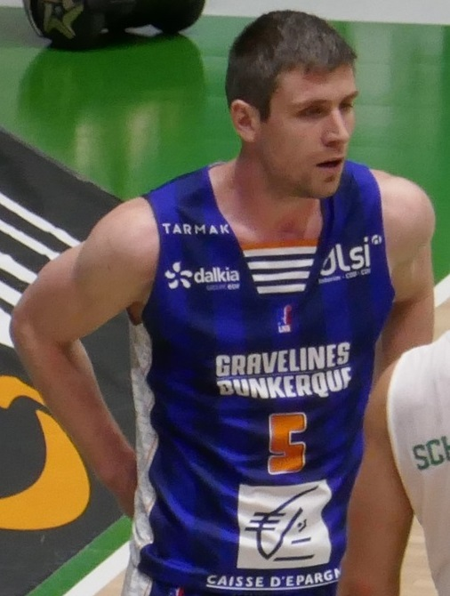 Quentin Serron-5